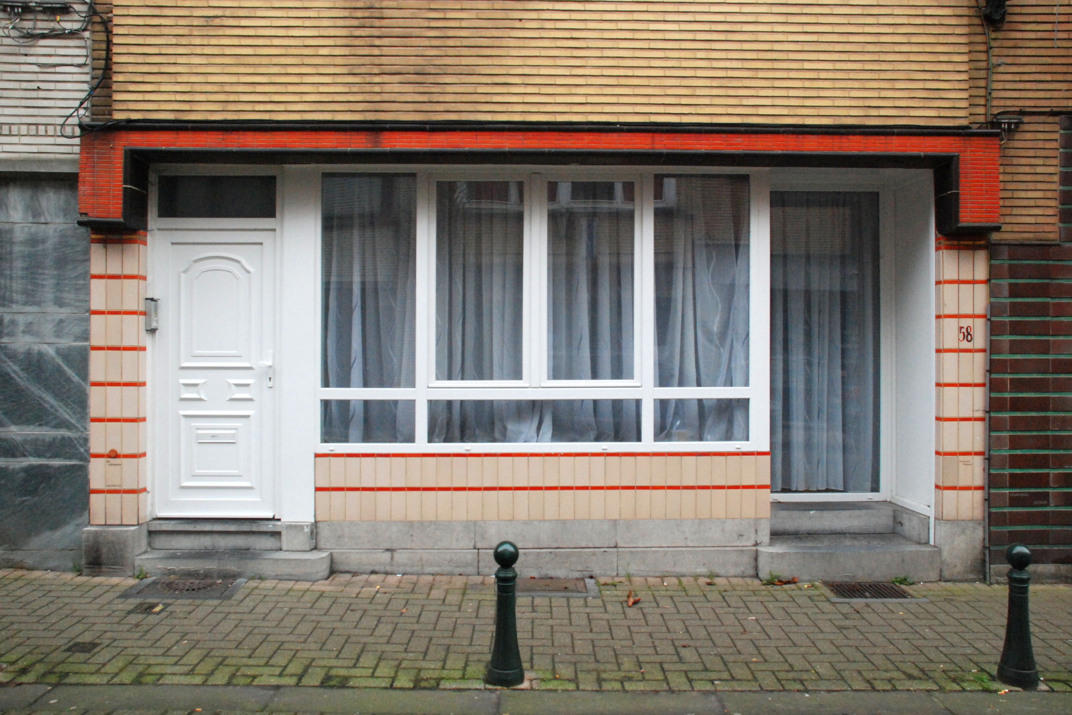 Belgique - Bruxelles - Berchem-Sainte-Agathe - Modernisme - Ateliers Helman